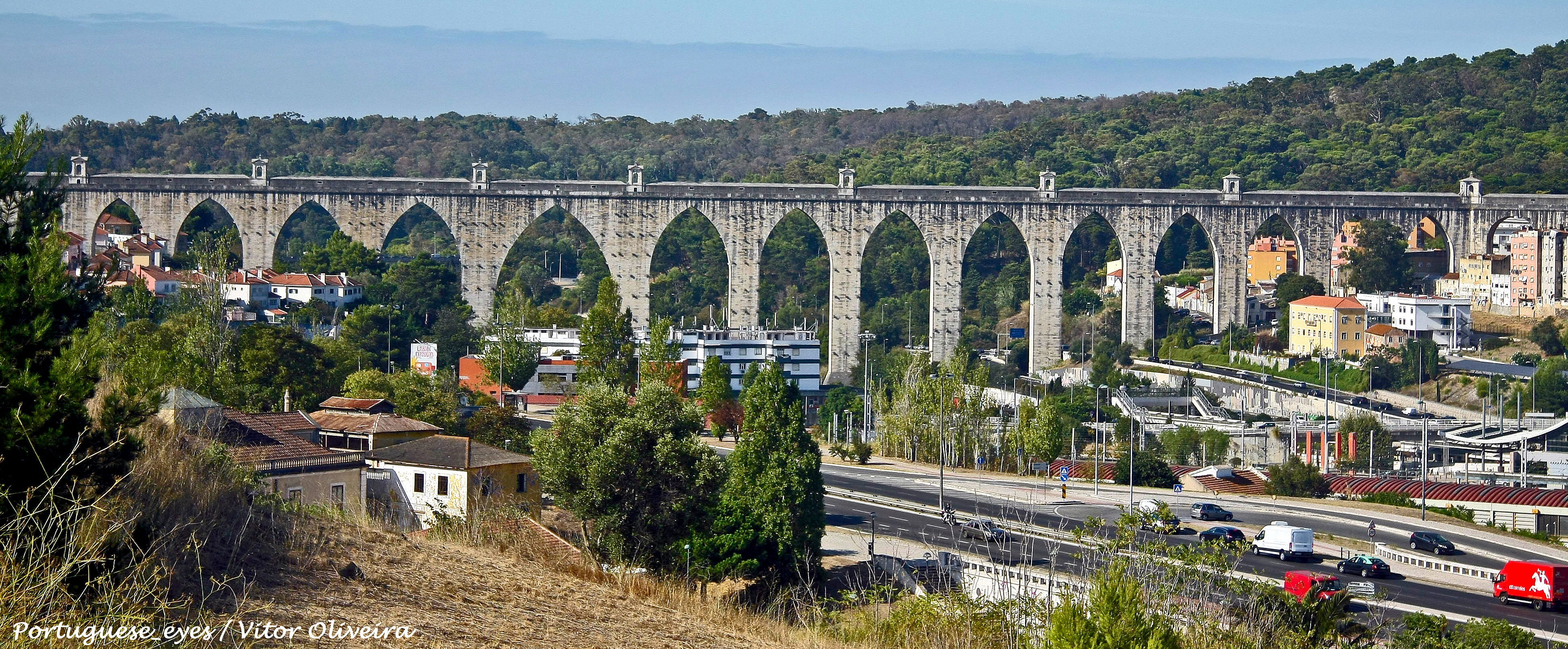 Construído entre 1731 e 1799, por determinação régia, o Aqueduto das Águas Livres constituiu um vasto sistema de captação e transporte de água, por via gravítica. Classificado como Monumento Nacional desde 1910 é considerado uma obra notável da engenharia hidráulica. A concretização desta obra implicou o recurso às nascentes de água das Águas Livres integradas na bacia hidrográfica da serra de Sintra, na zona de Belas, a noroeste de Lisboa. O trajecto escolhido coincidia, em linhas gerais, com o percurso do antigo aqueduto romano. A sua construção só foi possível graças a um imposto denominado Real de Água, lançado sobre bens essenciais como o azeite, o vinho e a carne. O sistema, que resistiu ao terramoto de 1755, é composto por: Um troço principal, de 14 km de extensão, com início na Mãe de Água Velha, em Belas, e final no reservatório da Mãe de Água das Amoreiras, em Lisboa Vários troços secundários destinados a transportar a água de cerca de 60 nascentes Cinco galerias para abastecimento de cerca de 30 chafarizes da capital No total, o sistema do Aqueduto das Águas Livres, dentro e fora de Lisboa, atingia cerca de 58 km de extensão em meados do século XIX, tendo as suas águas deixado de ser aproveitadas para consumo humano a partir da década de 60, do século XX. A extraordinária arcaria do vale de Alcântara, numa extensão de 941m, é composta por 35 arcos, incluindo, entre estes, o maior arco em ogiva, em pedra, do mundo, com 65,29 m de altura e 28,86 m de largura. O Museu da Água promove e dinamiza visitas livres e guiadas à arcaria do vale de Alcântara.